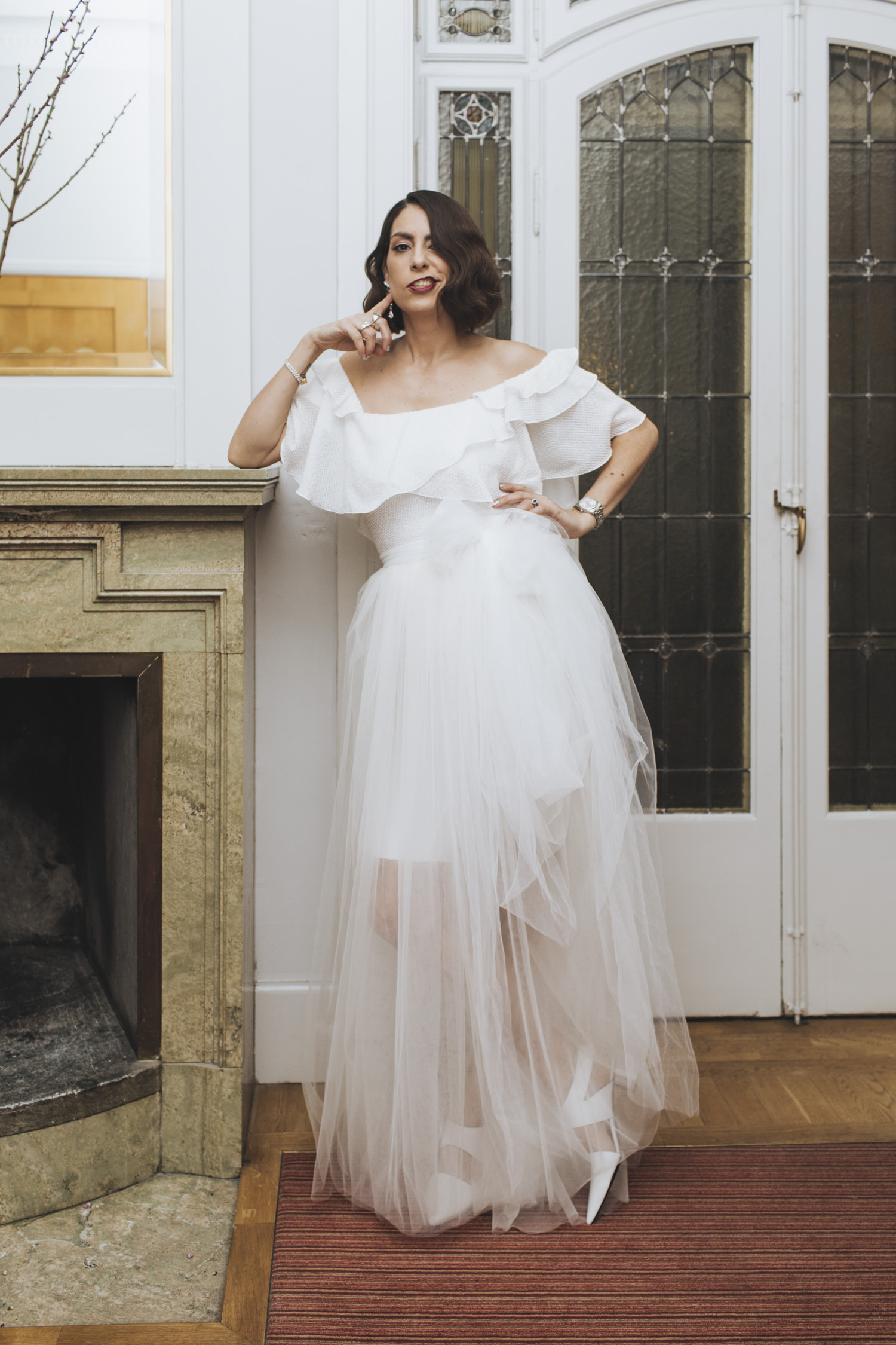 Nina Campioni programledde röda mattansändning på ELLEgalan 2019